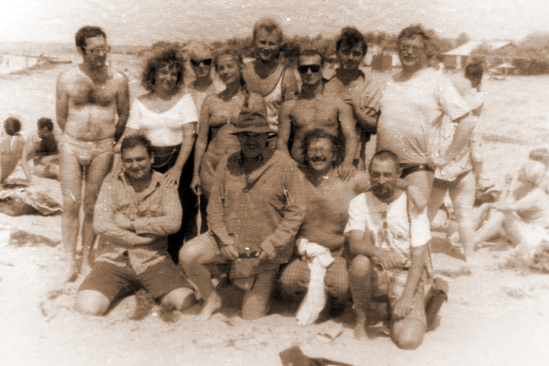 1994 год, Тузла, Василий Аксенов с участниками лагеря любителей фантастики "Комариная плешь"